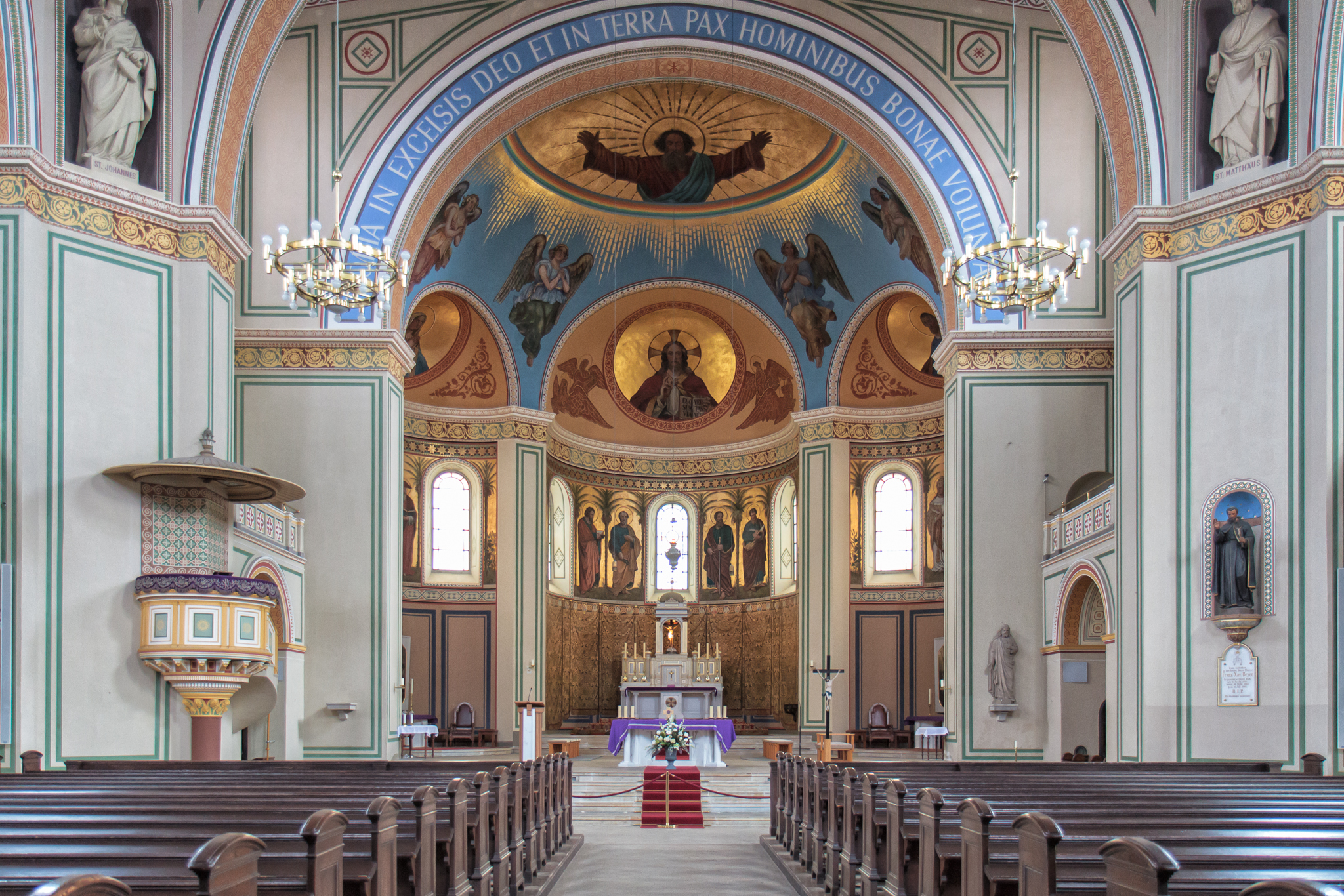 Potsdam - Peter-und-Paul-Kirche - Innenraum - 2013